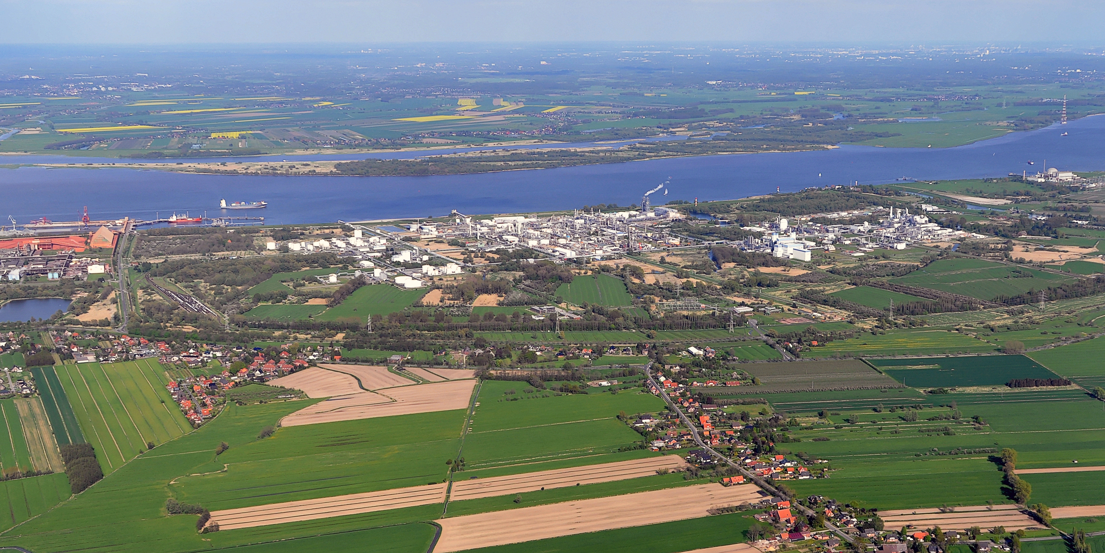 Luftbilder von der Nordseeküste 2012-05